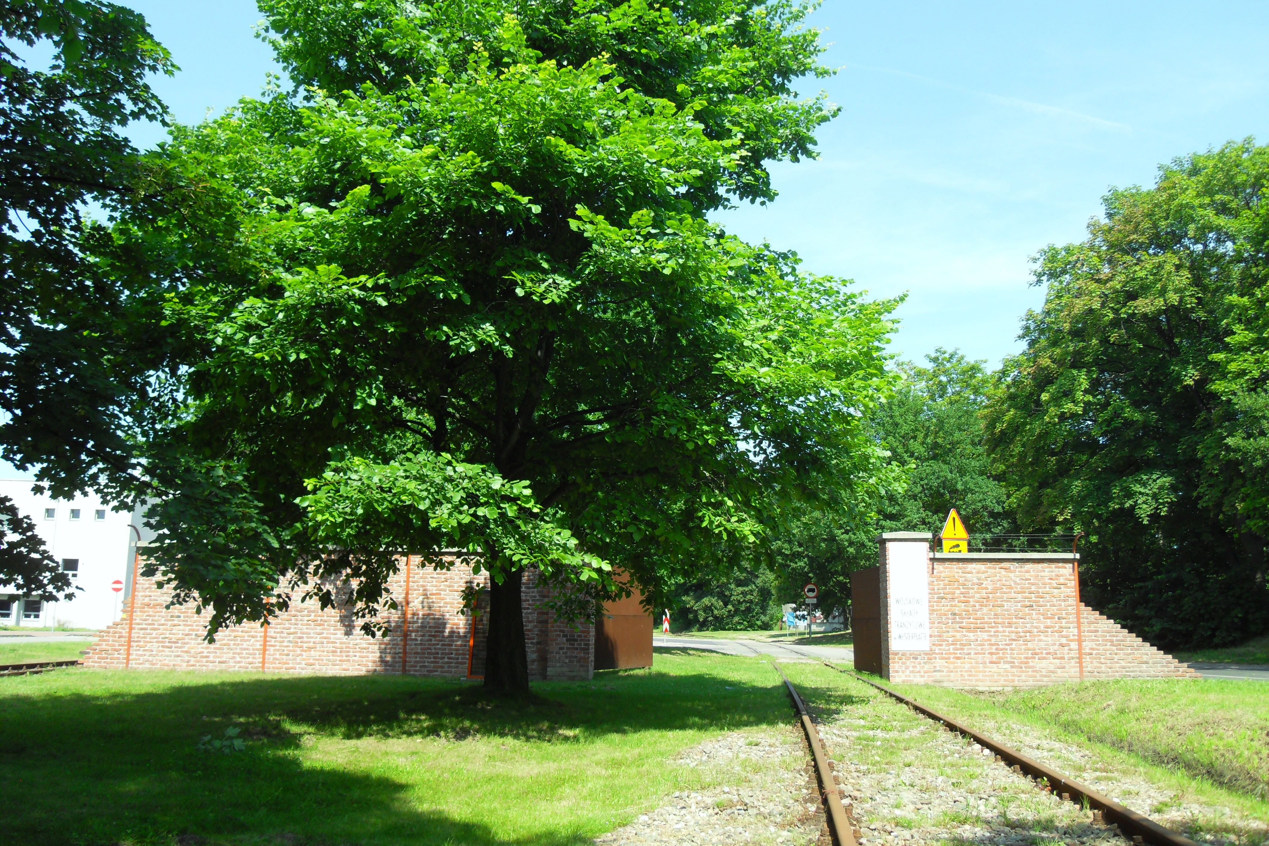 Gdańsk Westerplatte, rekonstrukcja bramy kolejowej i muru otaczającego Wojskową Składnicę Tranzytową.